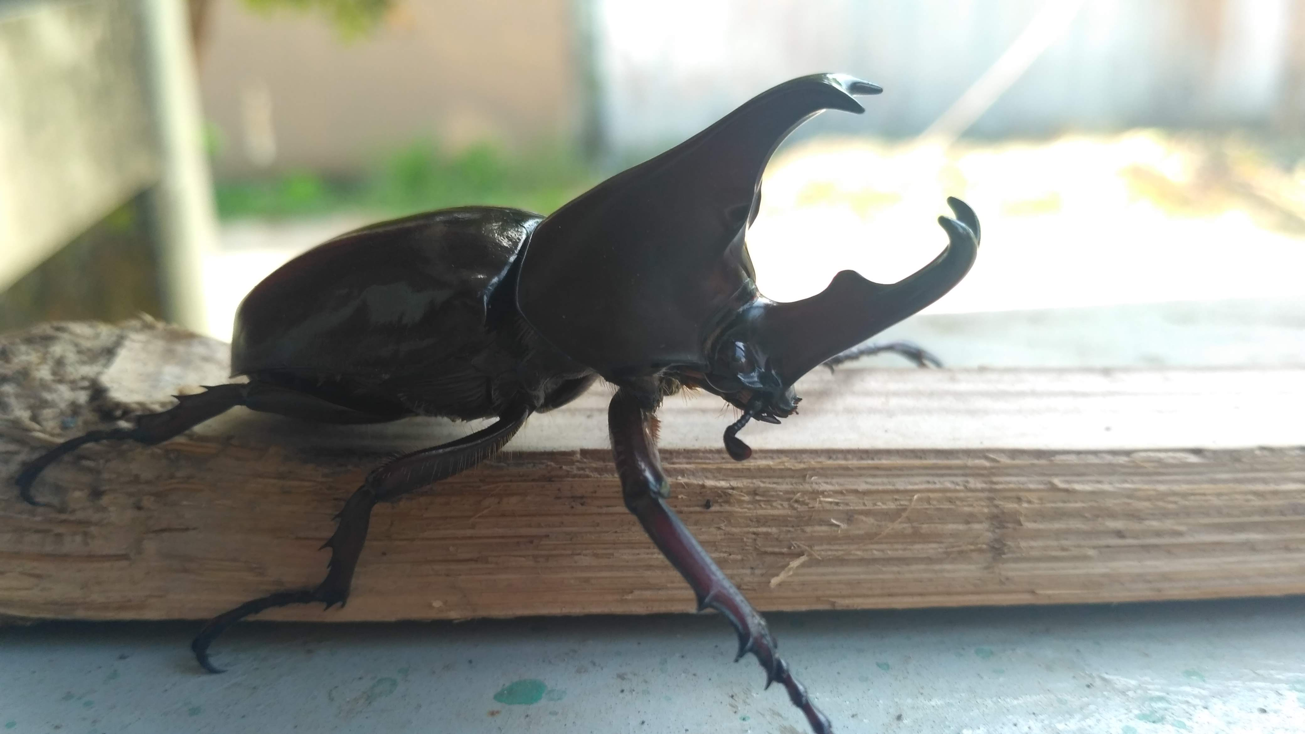 Kumbang Badak Jepang